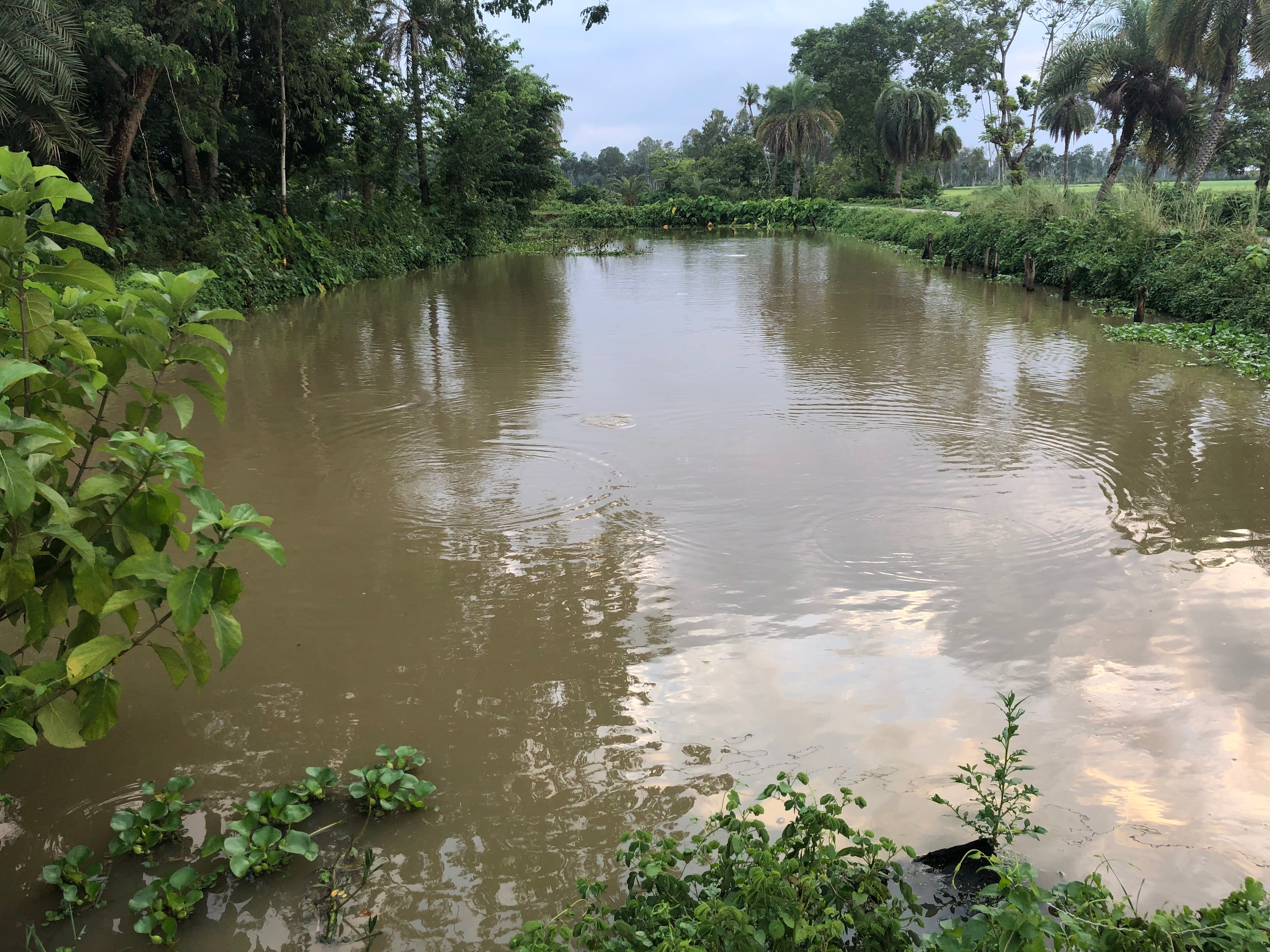 গুনাহার জমিদার বাড়ি ঢুকতে ডান পার্শ্বের খালের অংশ